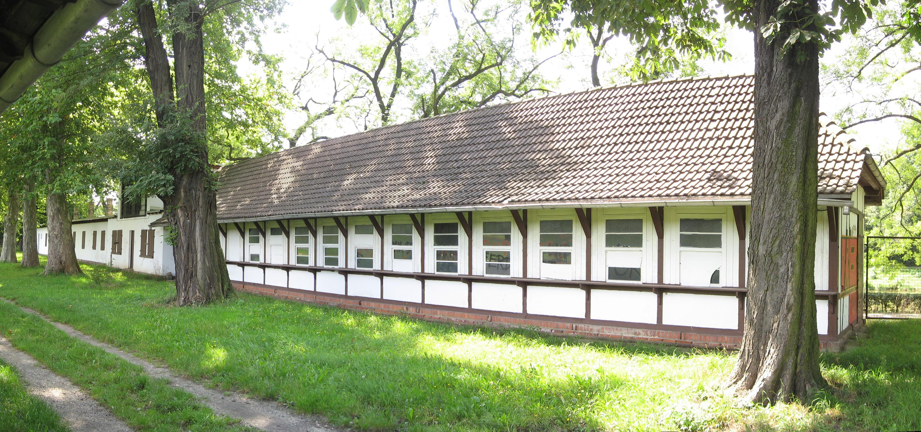 Leipzig, Galopprennbahn Scheibenholz, alter Totalisator am Elsterflutbett, erbaut 1908